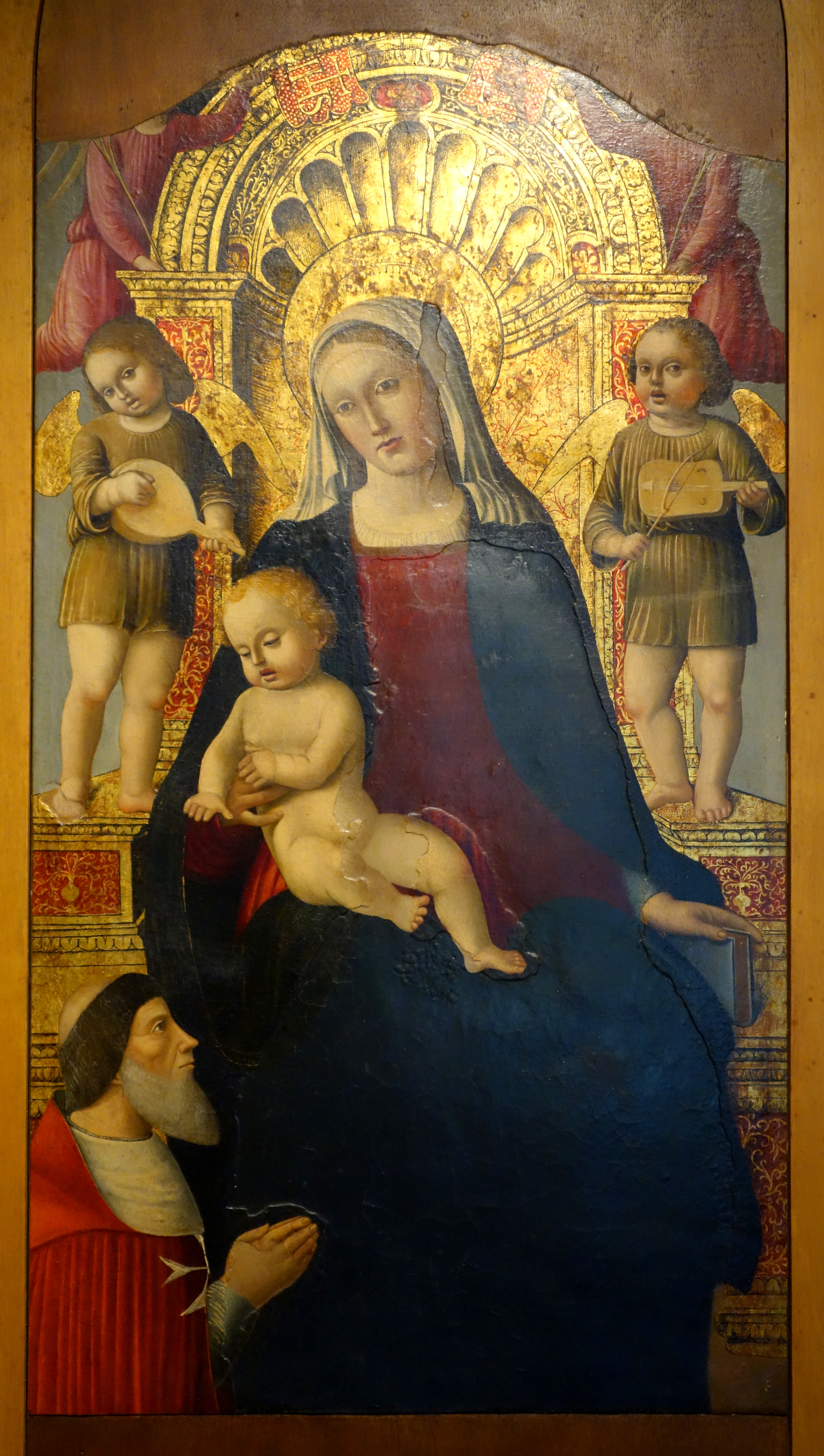 view 3